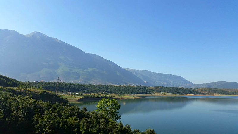 Gjallica mägi Kukëse maakonnas Fierza järve lähistel